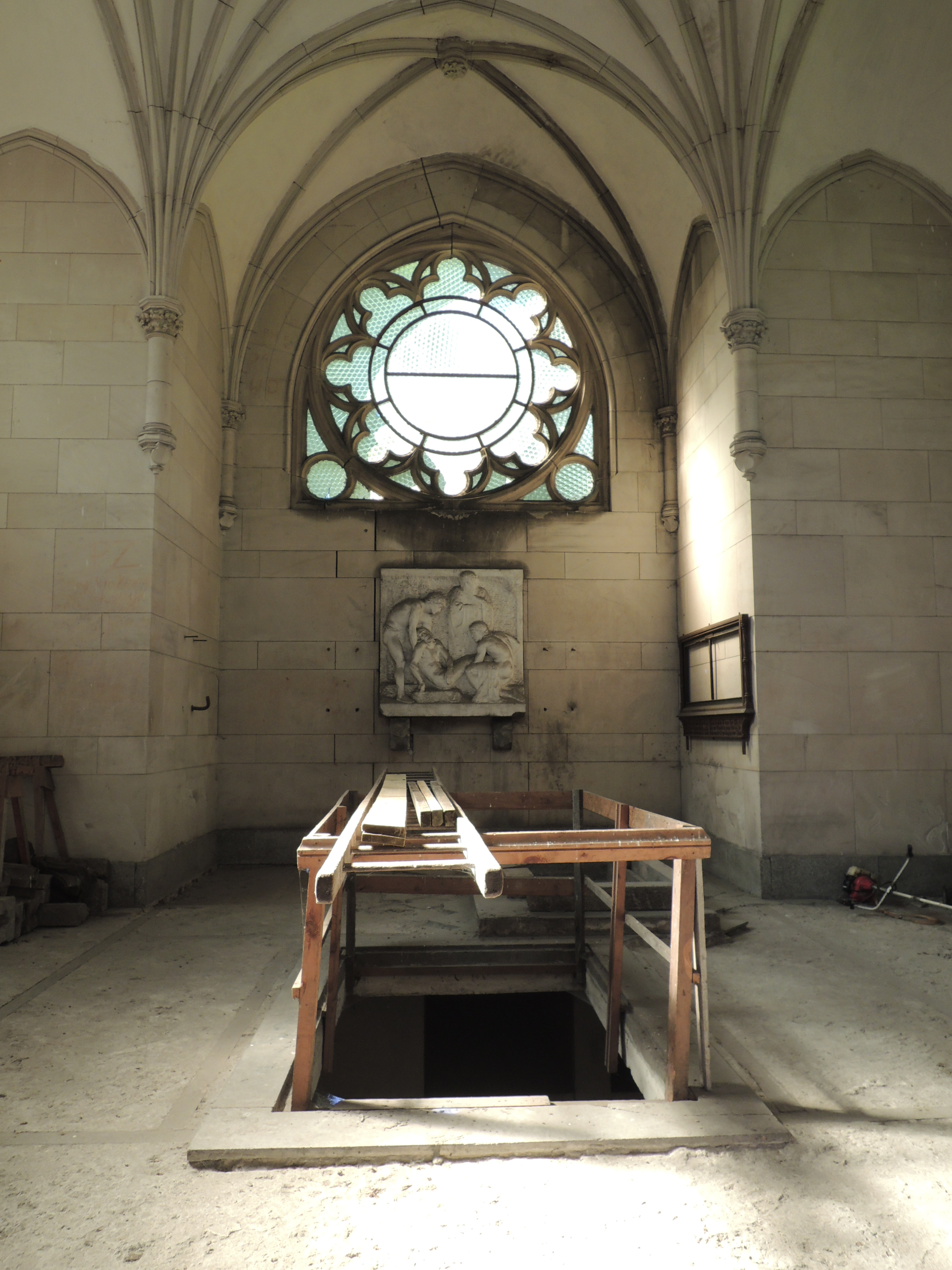 Wnętrze mauzoleum rodu Henckel von Donnersmarck w Świerklańcu, wybudowanego w latach 1903-1905 według projektu Juliusa Carla Raschdorffa